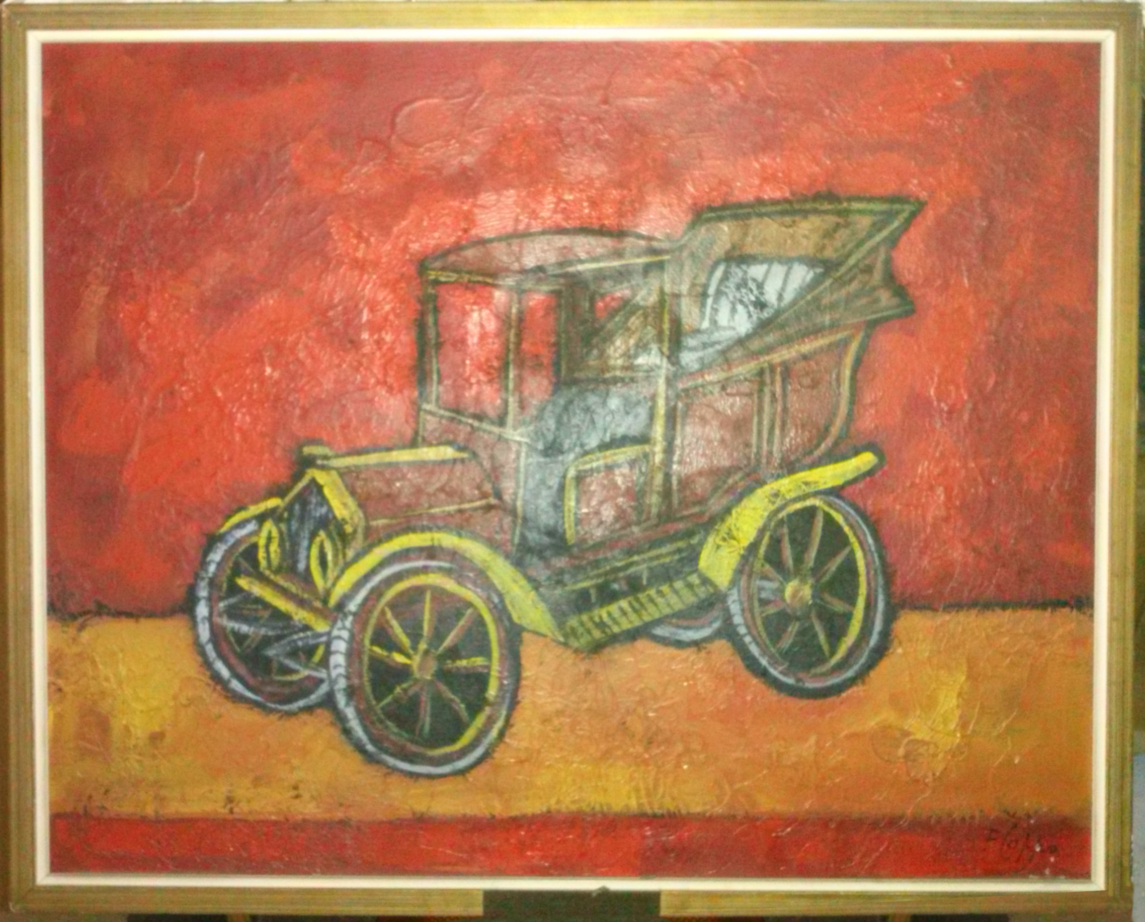 Quadro di una Florentia modello 12, 24 hp, del 1905, autore F. Coppo